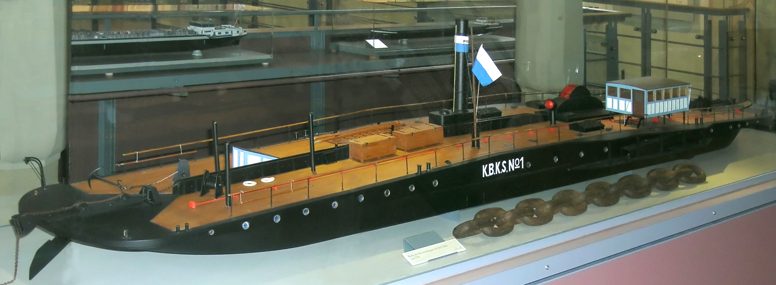 Schifffahrts- und Schiffbaumuseum Wörth am Main (Modell Kettenschleppschiff 1900-1912)